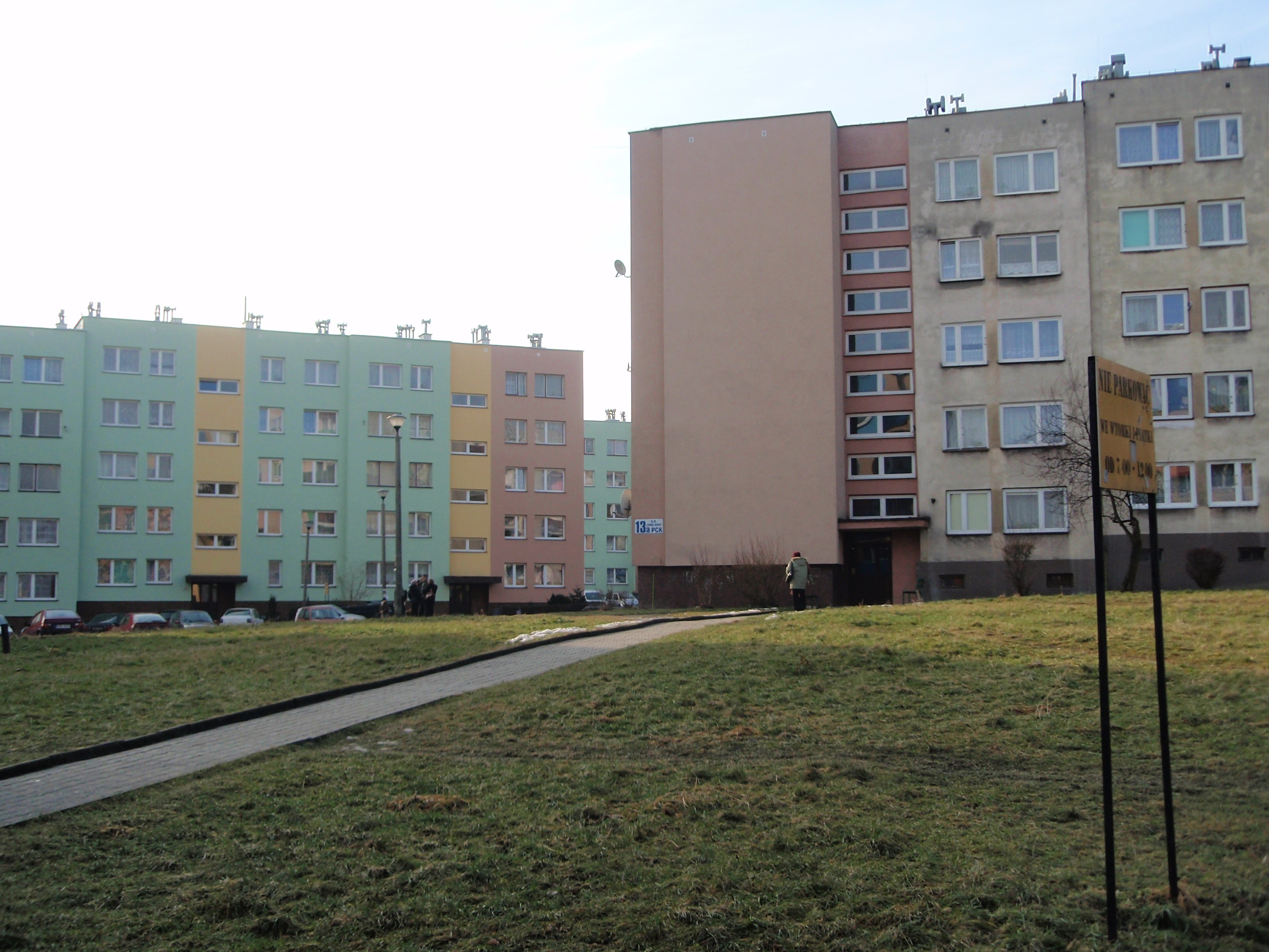 Osiedle PCK w Sławkowie (woj. śląskie)